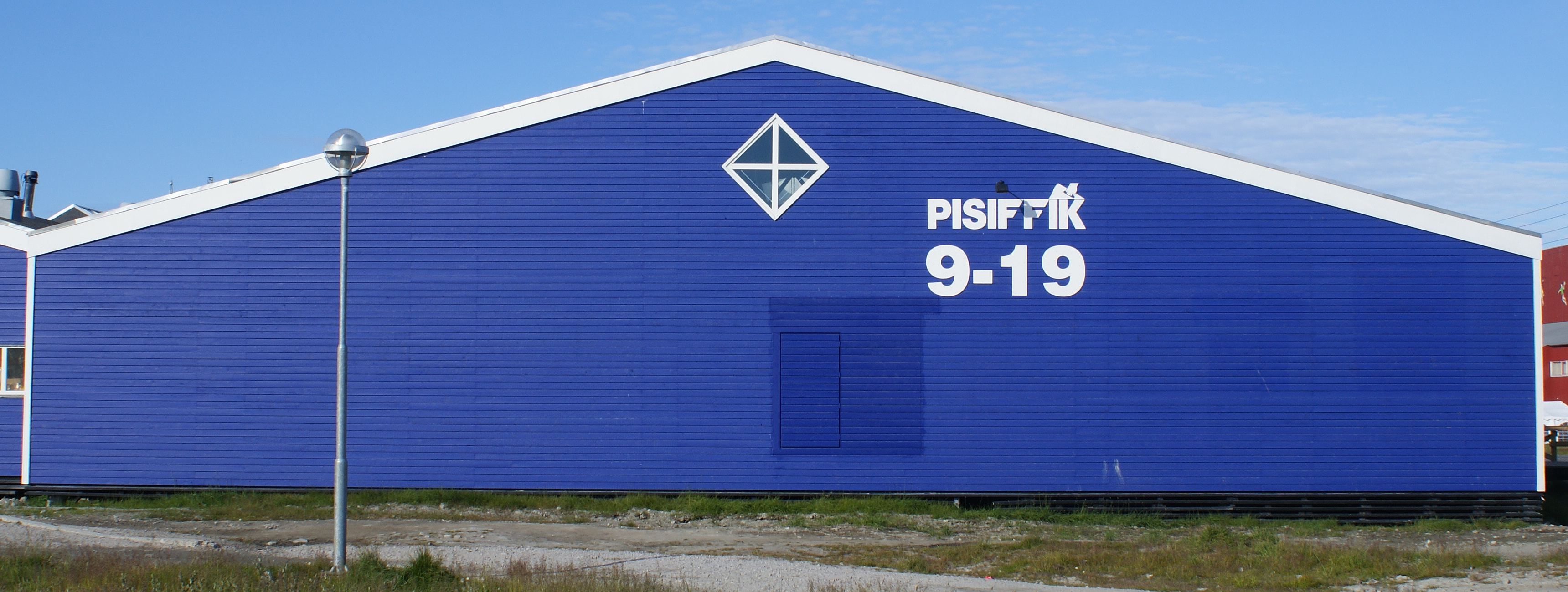 Pisiffik supermarket in Ilulissat, Greenland.